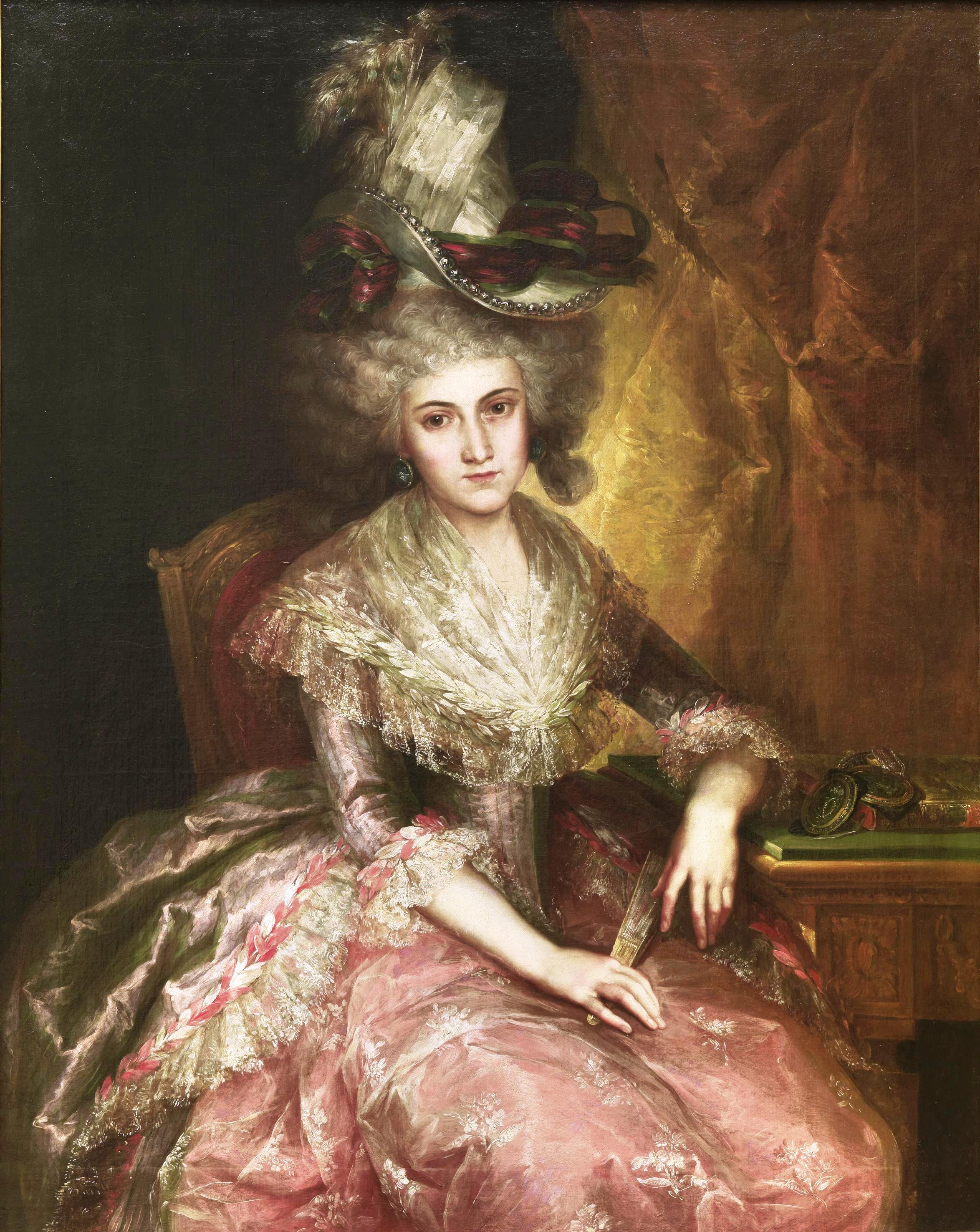 Retrato de la aristócrata española María Pilar de la Cerda y Marín de Resende (1777-1812), que era hija de los condes de Parcent y contrajo matrimonio en Valencia el día 1 de agosto de 1795 con Diego Isidro de Guzmán y de la Cerda, primo segundo suyo y también duque de Najera, marqués de Aguilar de Campoo y de Montealegre y conde de Oñate, de Paredes de Nava y de los Arcos y seis veces Grande de España. Este lienzo puede considerarse la obra maestra de la primera producción retratística de Vicente López (1772-1850), correspondiente al período de sus años valencianos inmediatamente posteriores a su estancia en Madrid, en los que todavía no está cuajado su estilo más personal, que se definiría plenamente a partir de 1800.